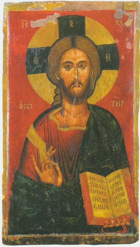 Икона на Христос Спасител от църквата "Свети Йоан Канео" в Охрид.